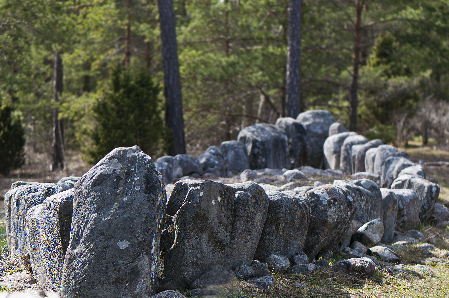 Stor, restaurerad skeppssättning från bronsålder.